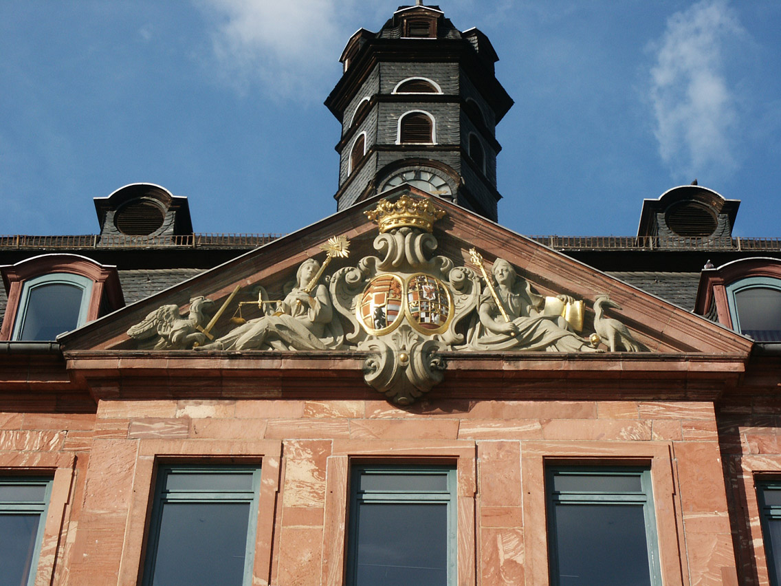 Von mir gemacht....